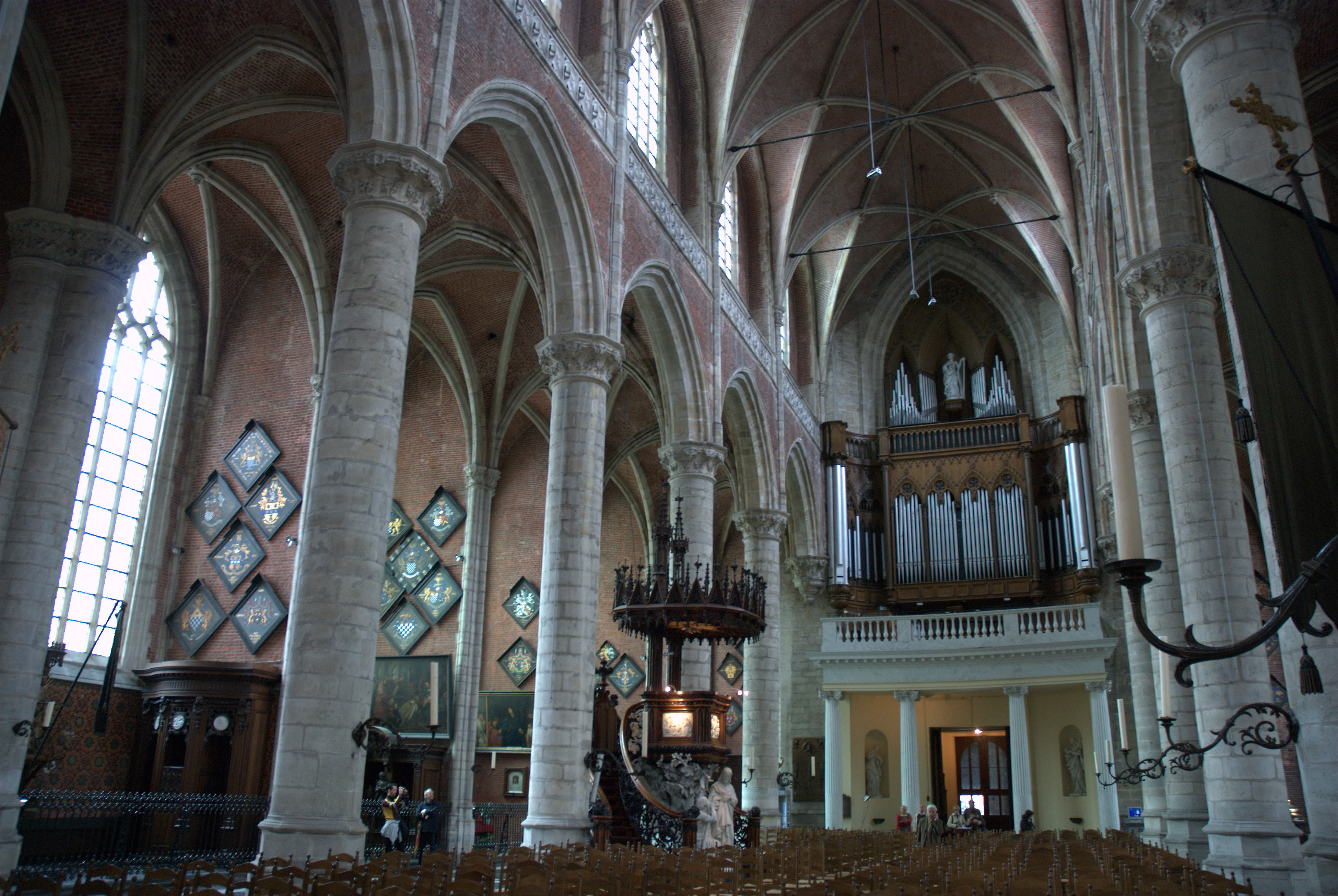 De Sint-Michielskerk te Gent, België